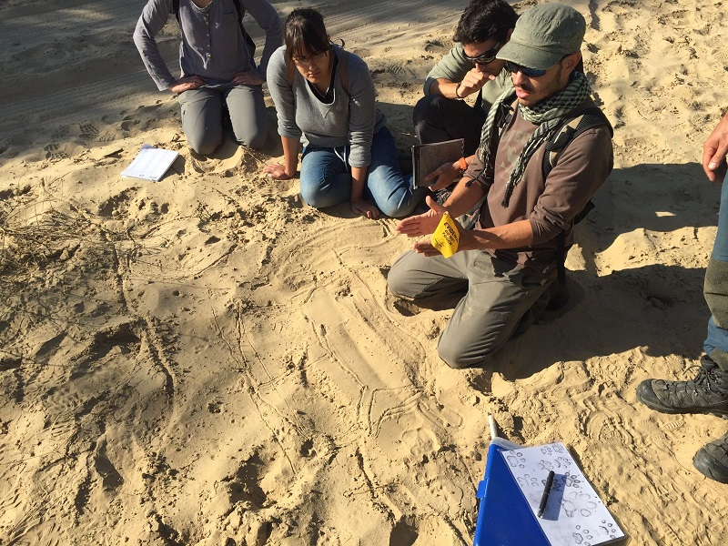 Curso formativo sobre rastreo en el Parque Nacional de Doñana